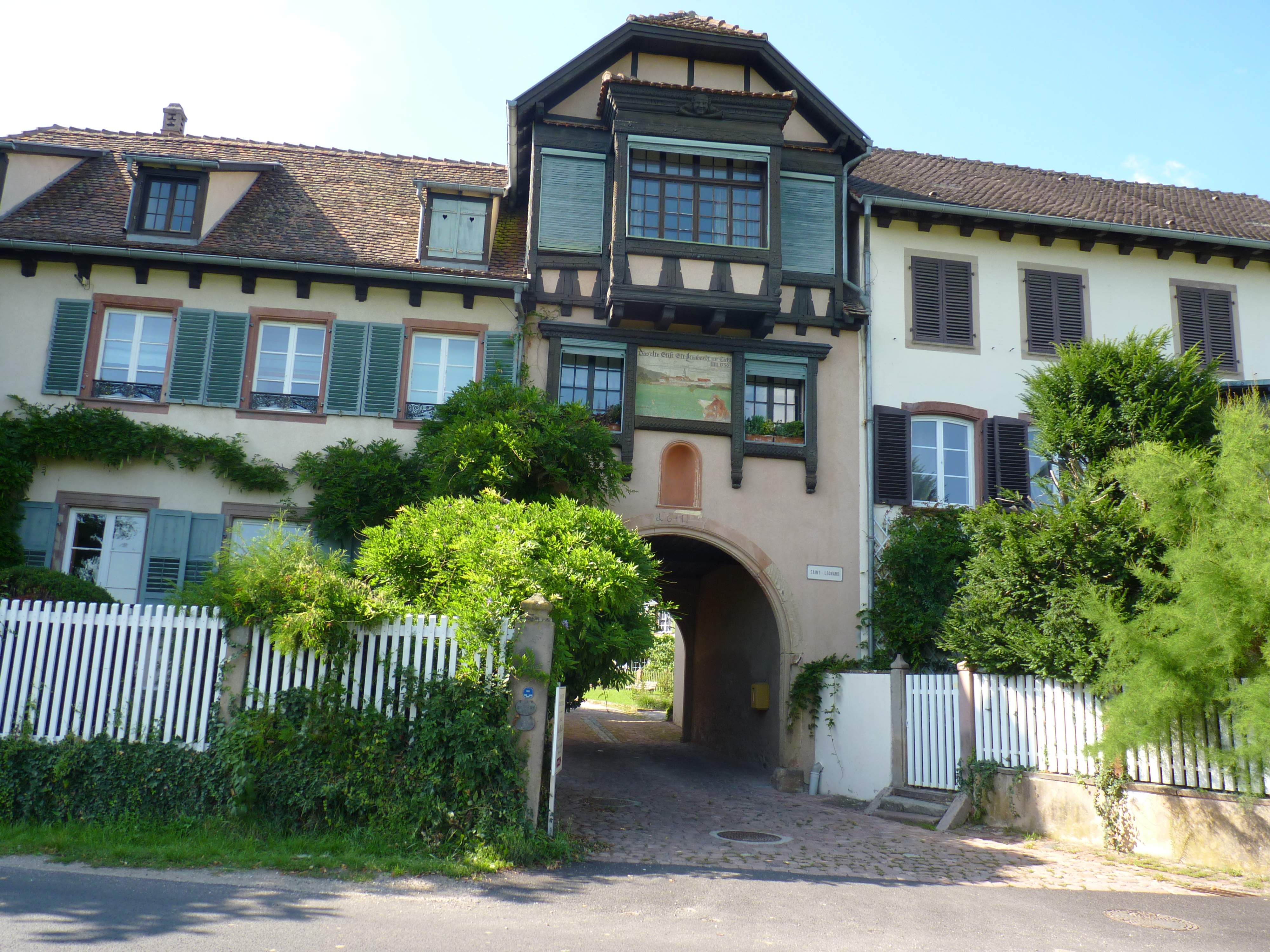 Alsace, Bas-Rhin, Porche de l'ancien couvent bénédictin de Saint-Léonard (Boersch)